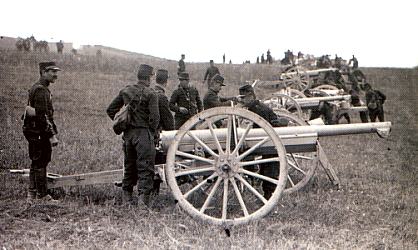 Batteria di cannoni francesi da 75 mm in azione all'inizio della prima guerra mondiale (immagine tratta da cartolina postale francese del 1914-1915)